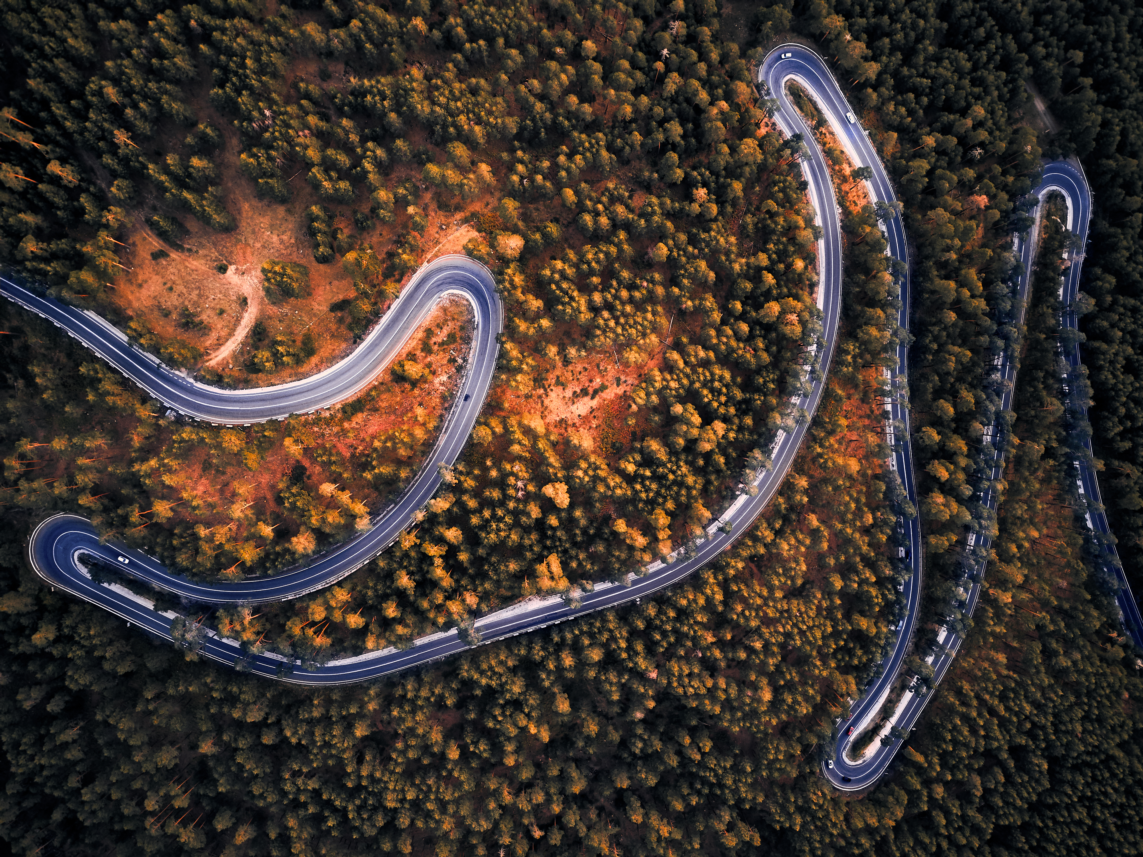 las 7 revueltas